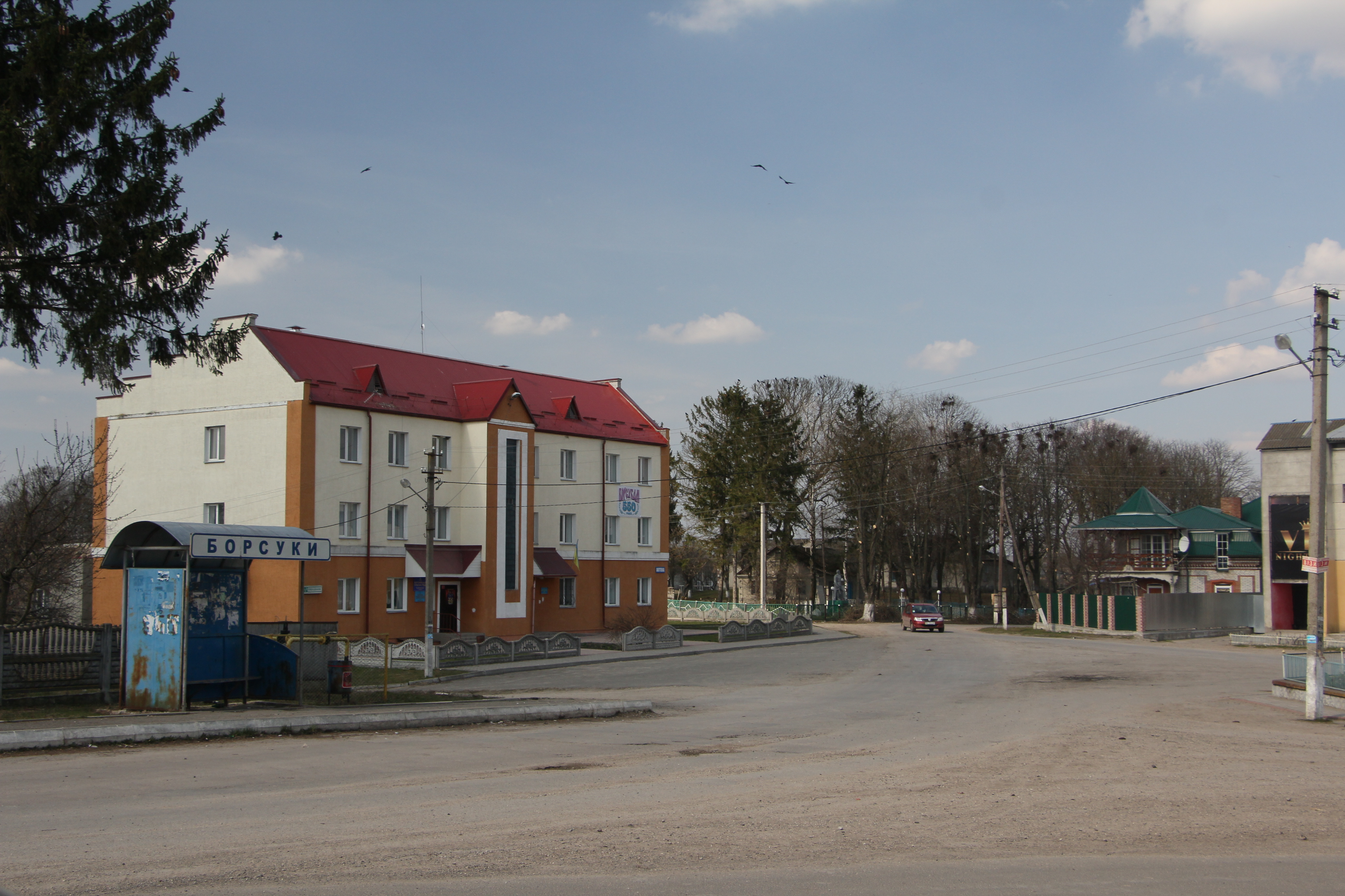 Будівля сільської ради та автобусна зупинка в селі Борсуки, Ланівецького району, Тернопільської області.